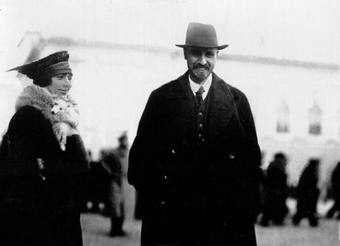 El político menchevique Irakli Tsereteli, ministro de Correos y Telégrafos del primer Gobierno de coalición, en mayo de 1917.